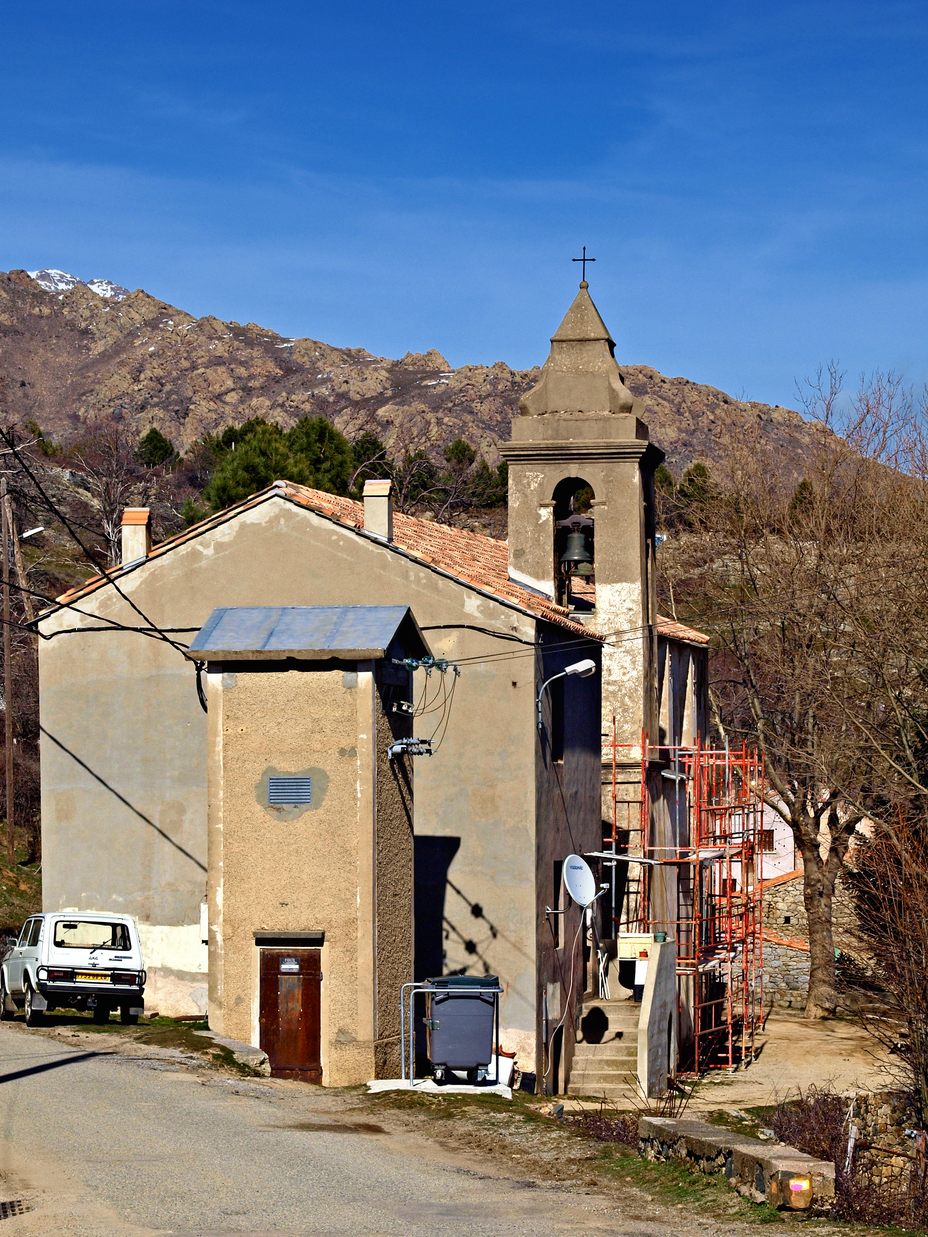 Lozzi, Niolo (Haute-Corse) - Église paroissiale Saint-Jacques (San Ghiacumu)